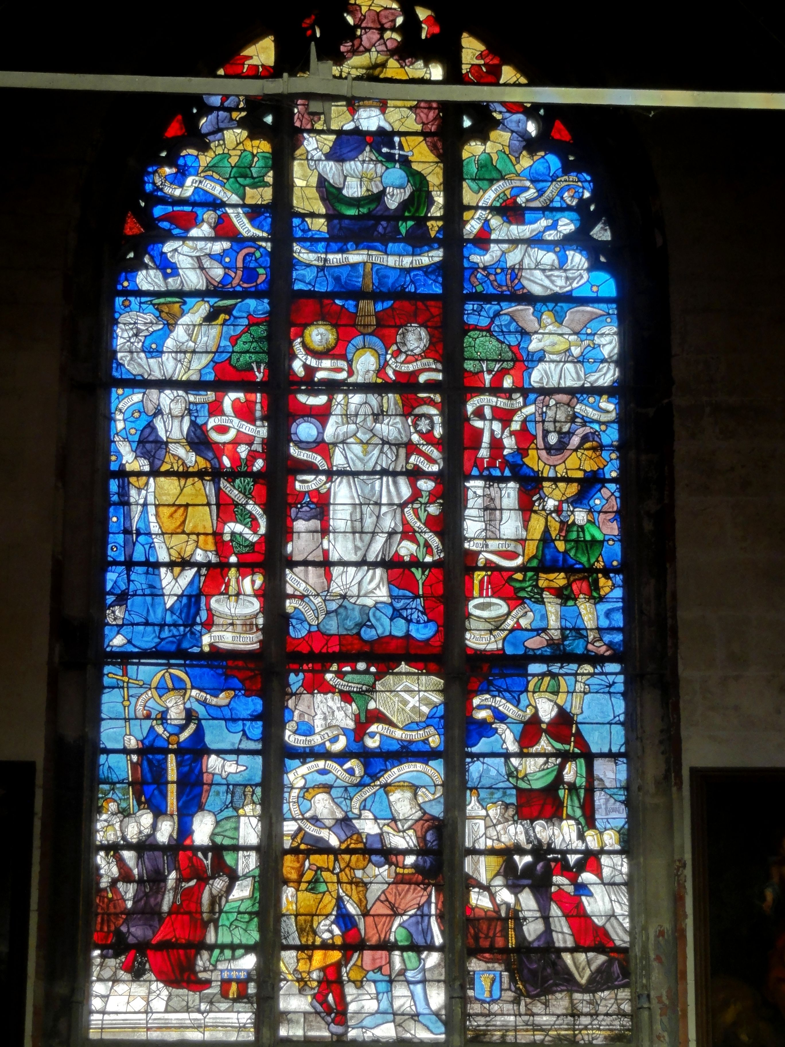 Vitrail n° 13 - litanies de la Vierge.